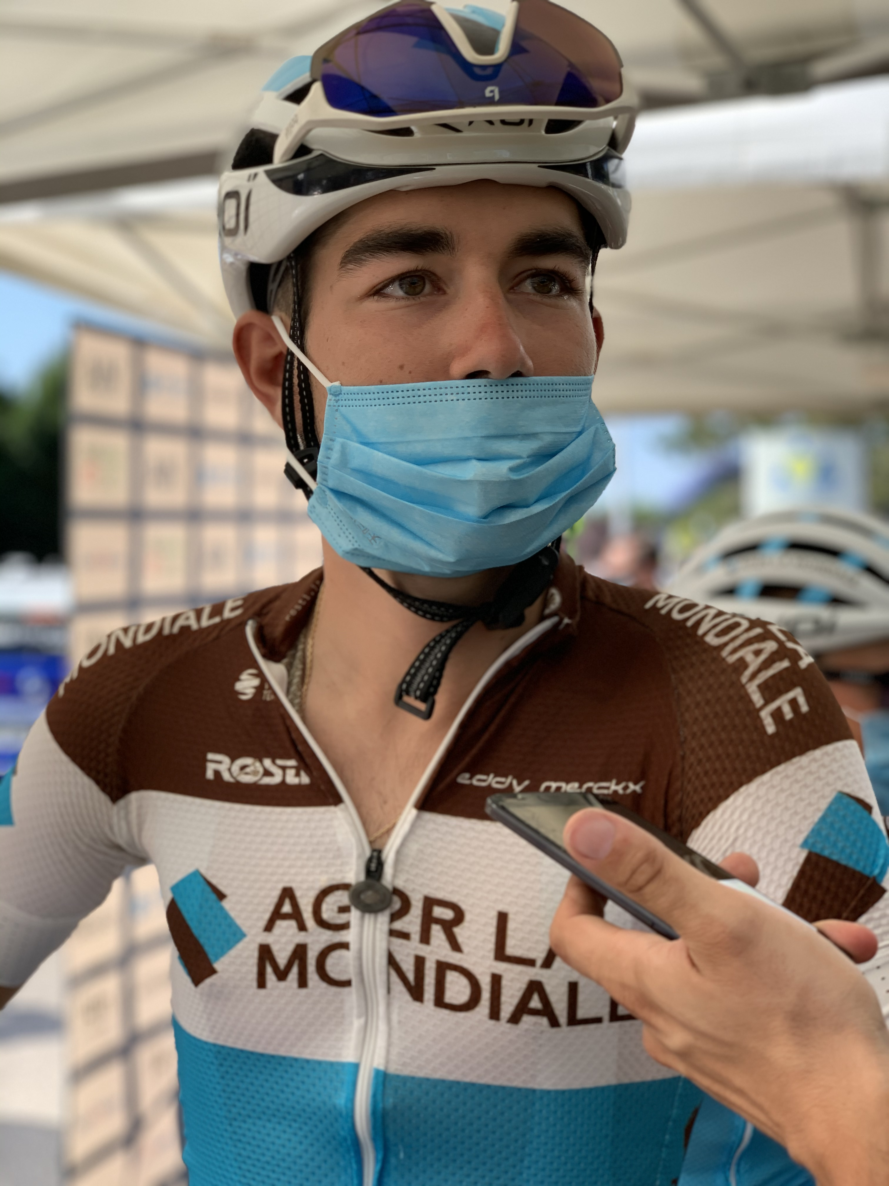 Clément Champoussin au départ de la troisième étape du Tour de l'Ain 2020.